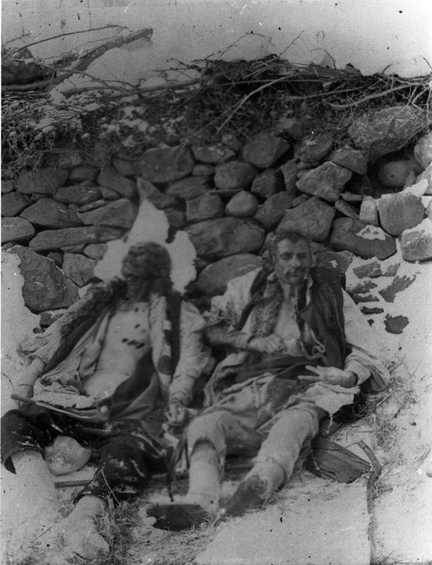 Христо и Ангел Трайчев убити.